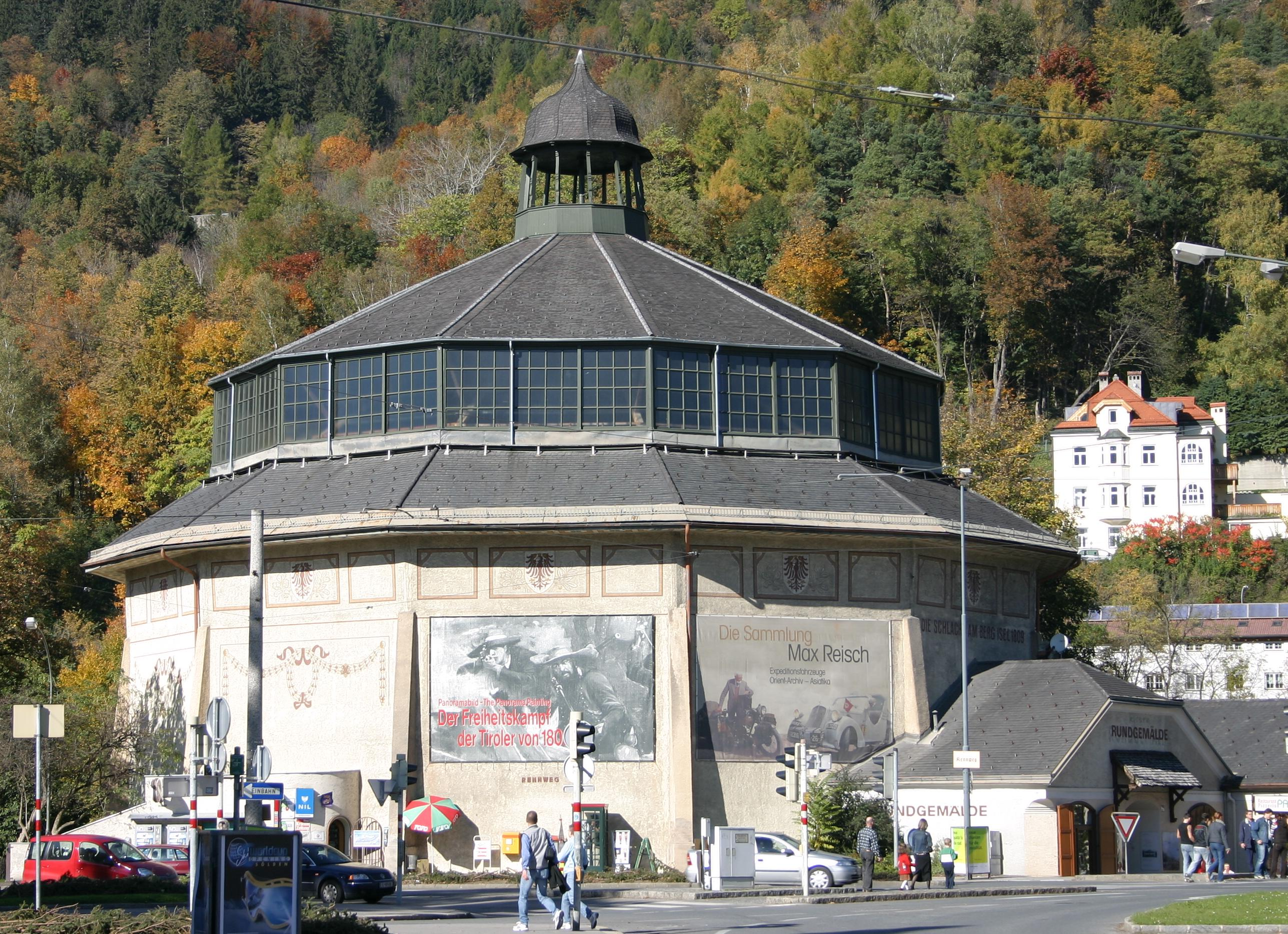 Außenansicht des ehemaligen Riesenrundgemäldes in Innsbruck, der Rotunde. 2010 wurde das Panorama auf den Berg Isel in ein neues Museum übersiedelt, seitdem ist die Nachnutzung unklar. [1]